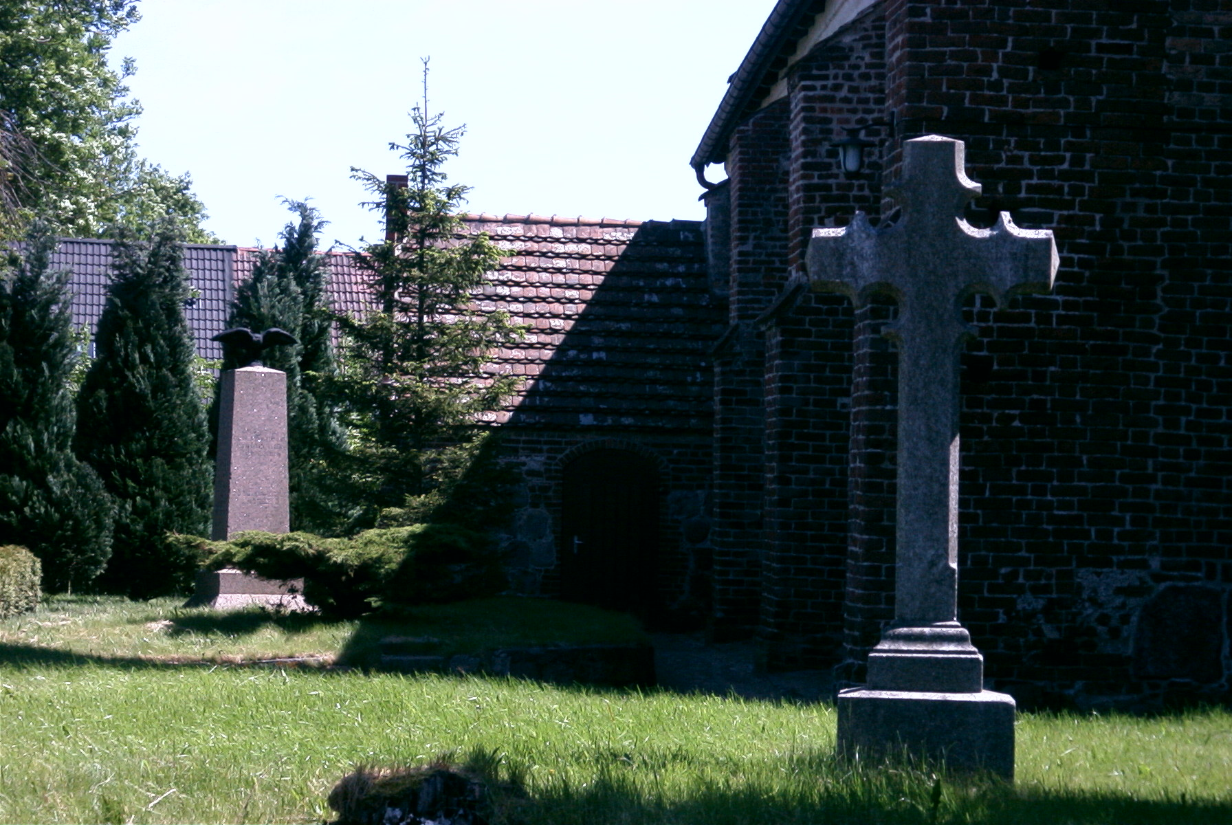 Kirchhof Kröslin - Denkmale